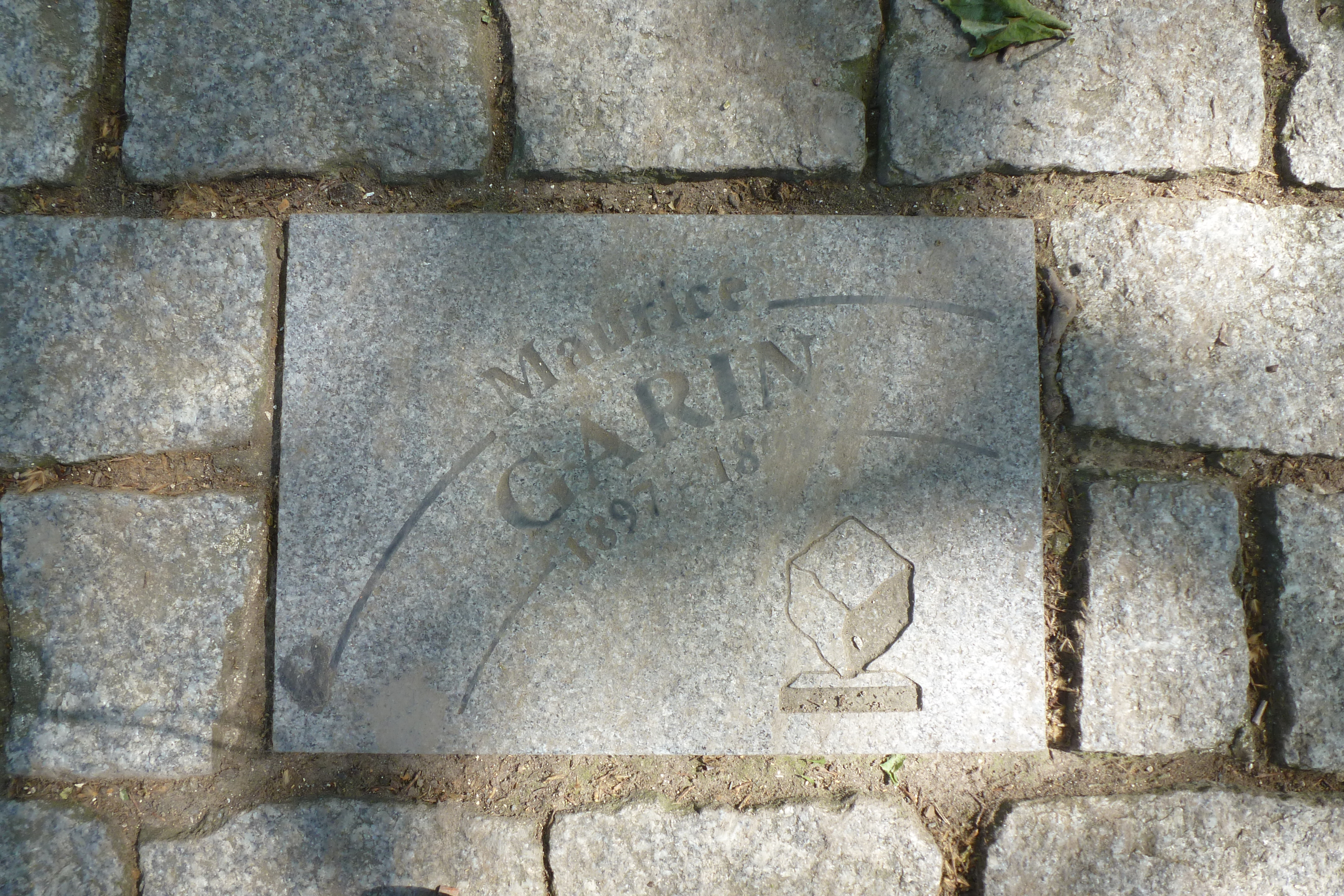 Pflasterstein für Maurice Garin auf der Allee Charles Crupelandt in Roubaix